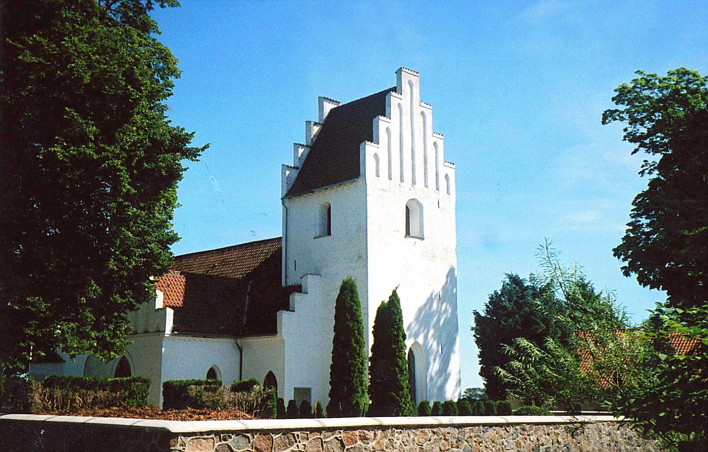 Ulse Kirke, Ulse, Faxe Kommune